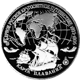 Географическая серия: Первое русское кругосветное плавание: Карта плавания